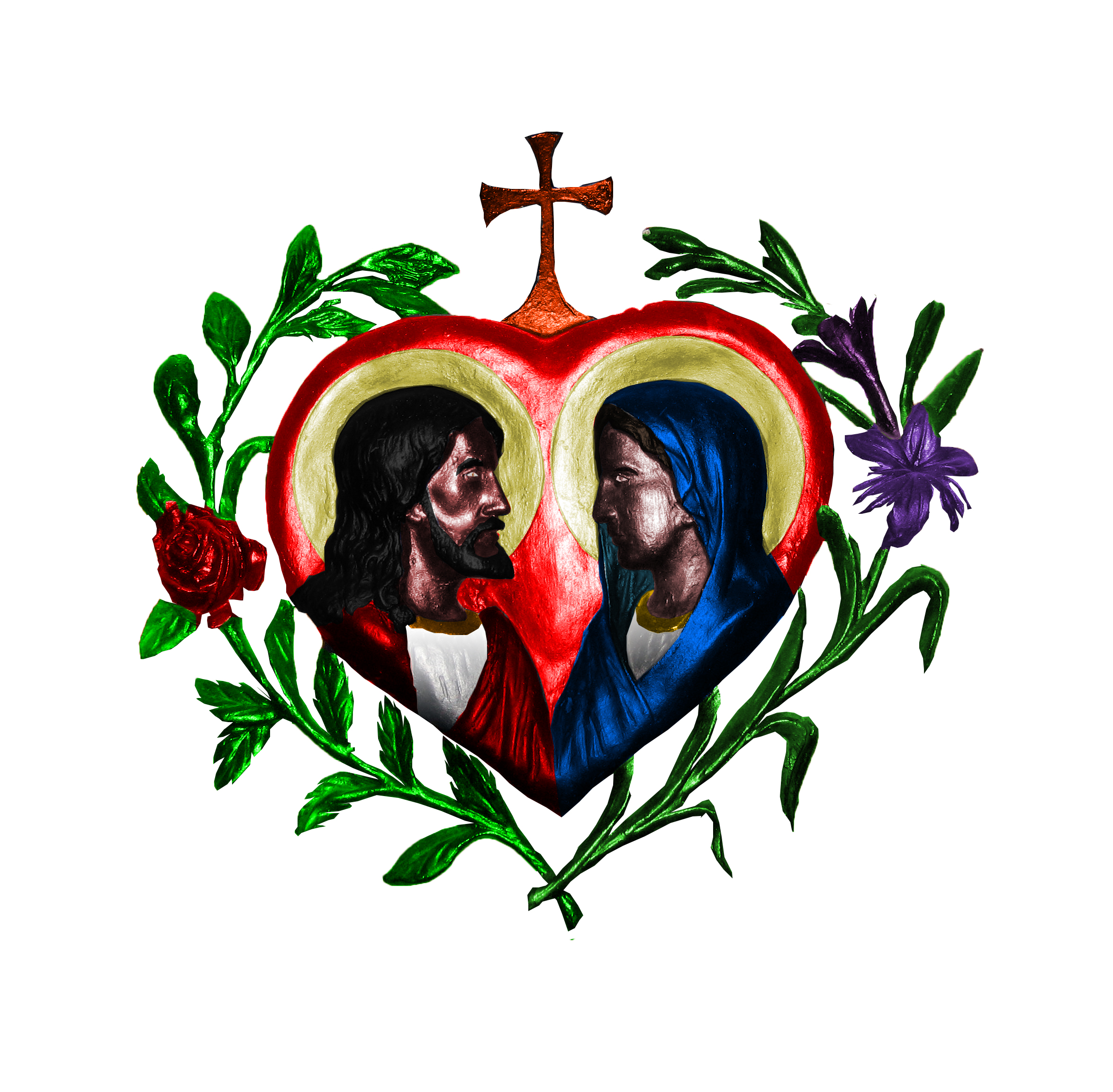 Signo que identifica a la CJM - padres eudistas.